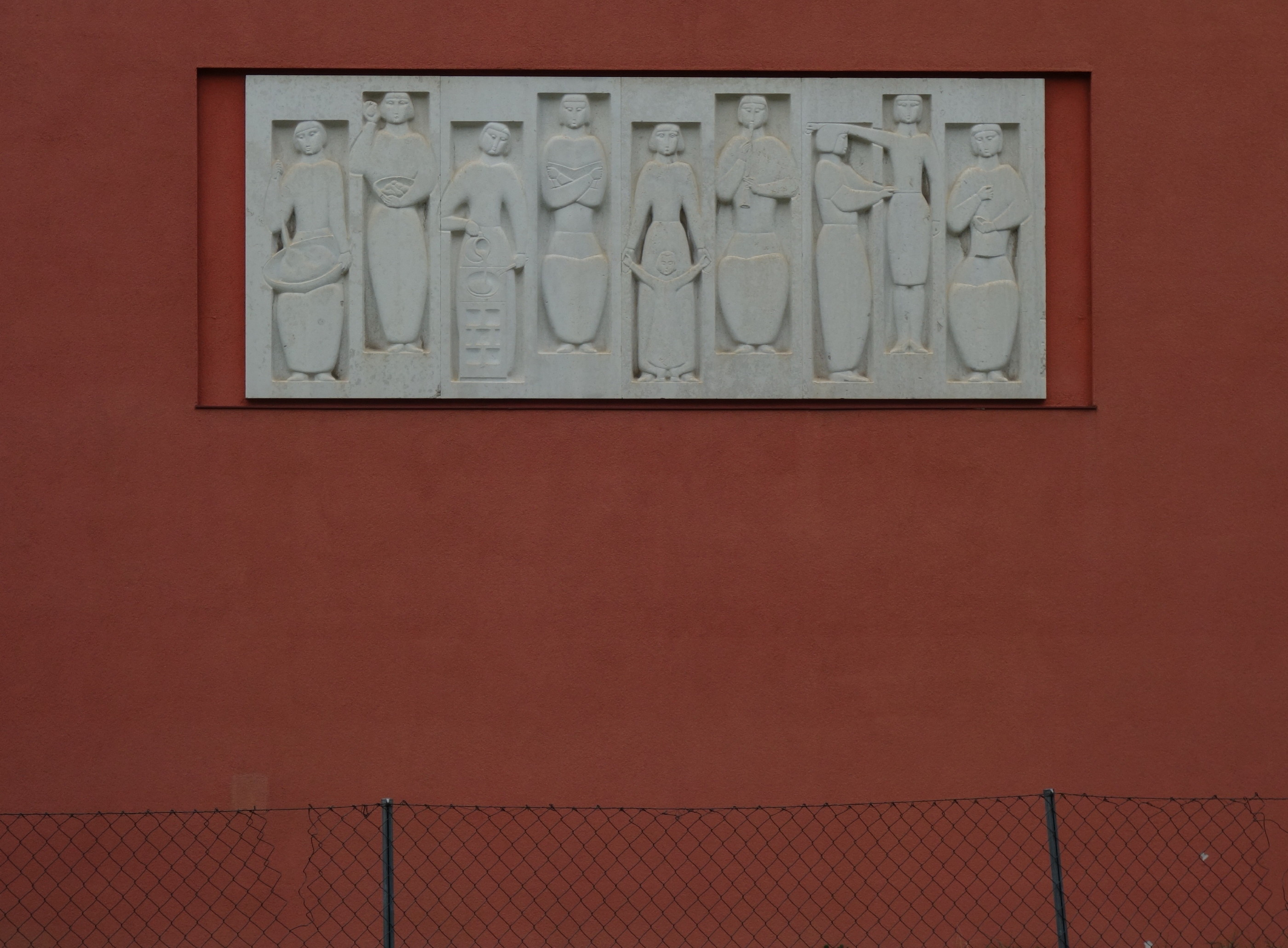 Fassadengestaltung, Höhere Bundeslehranstalt für wirtschaftliche Frauenberufe, Schrödingerstraße 5